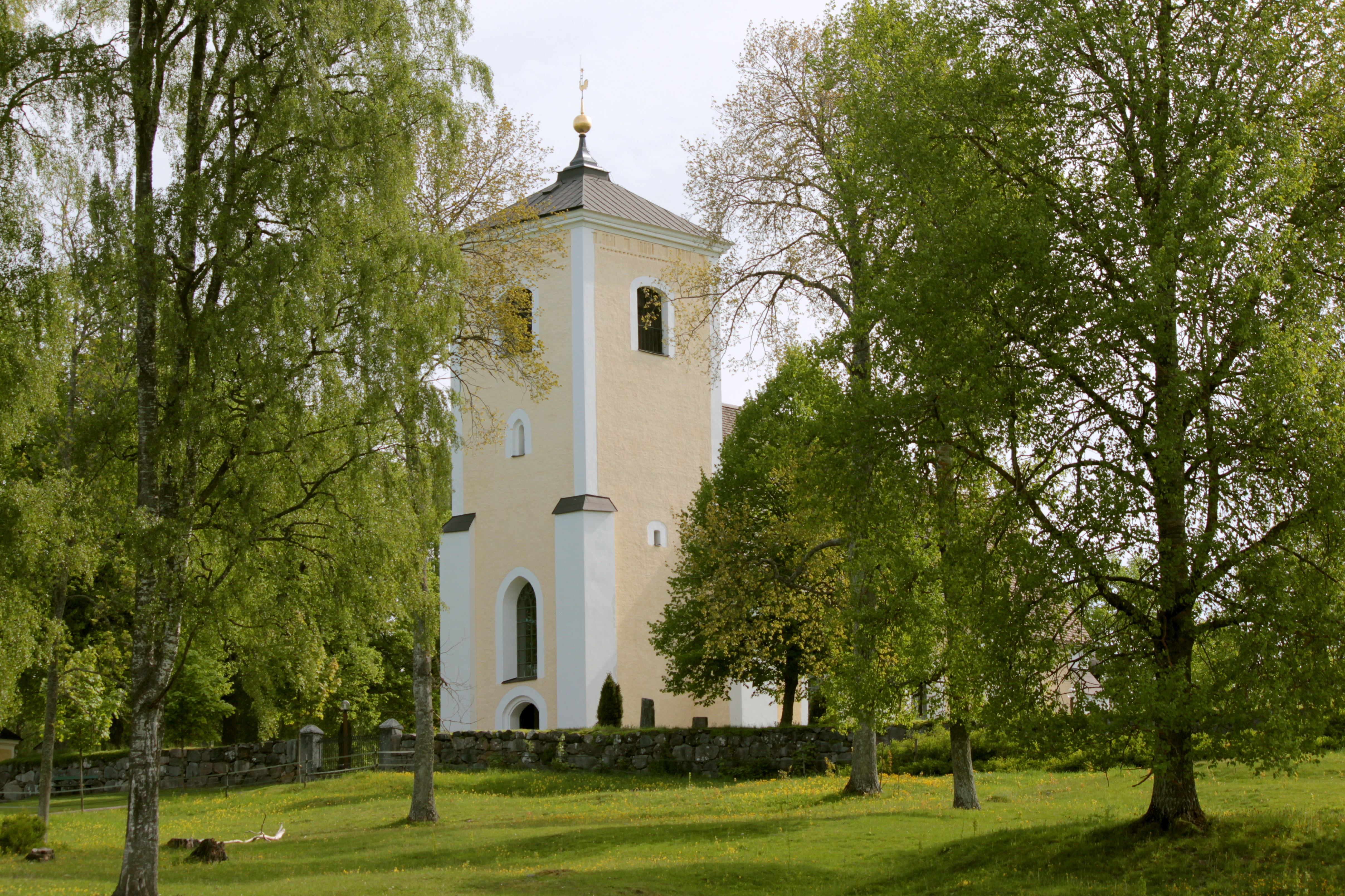 Lena kyrka. Foto uppladdat som en del i Bergslagssafarin 26 maj 2012.